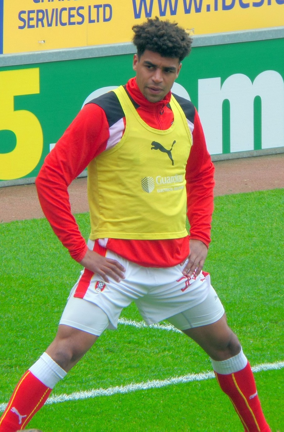 SAMSUNG CAMERA PICTURES